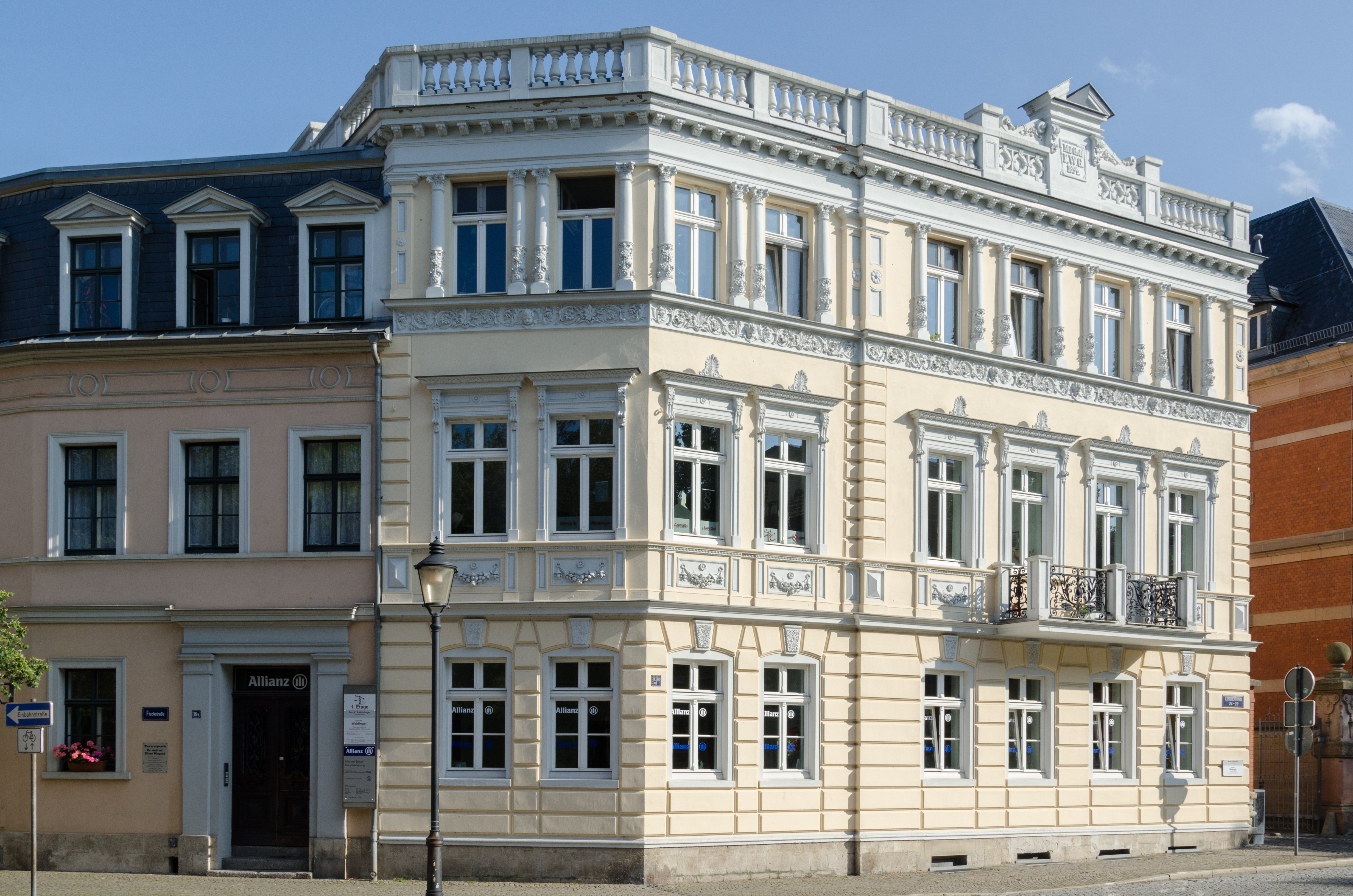 Naumburg, Fischstraße 19a, Flügel am Lindenring